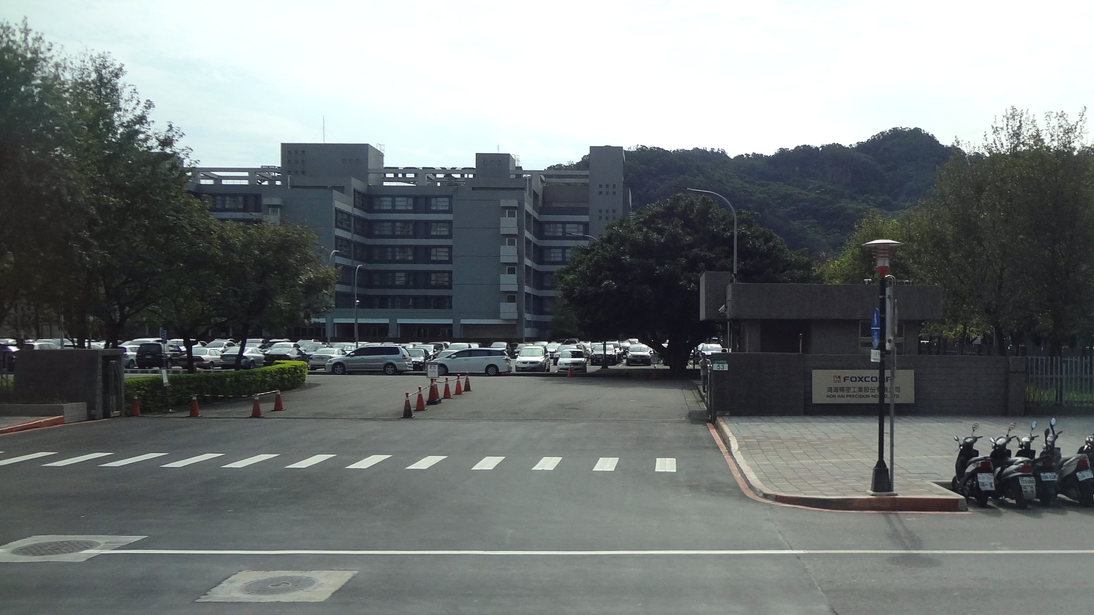 鴻海精密頂埔廠，位於新北市土城區中央路四段53號（台北捷運頂埔站旁）。本照片係於遊覽車上拍攝。